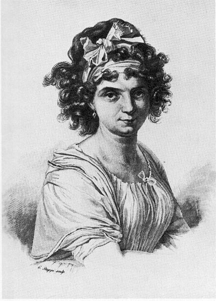 La soprano italiana Celeste Coltellini (1760-1829). Museo del Teatro Alla Scala de Milán.